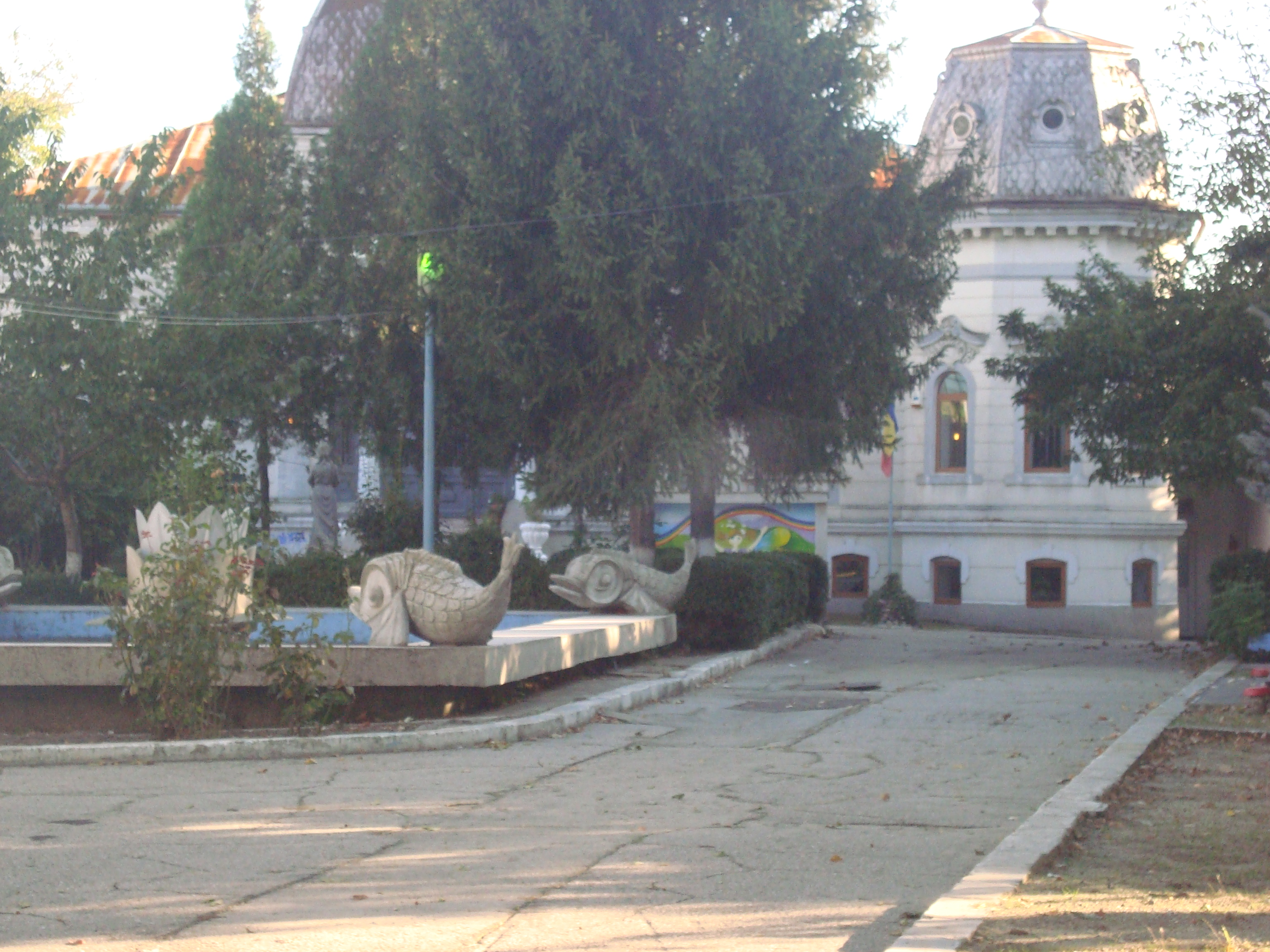 Palatul Copiilor, Bd. Carol I nr. 24, Drobeta-Turnu Severin